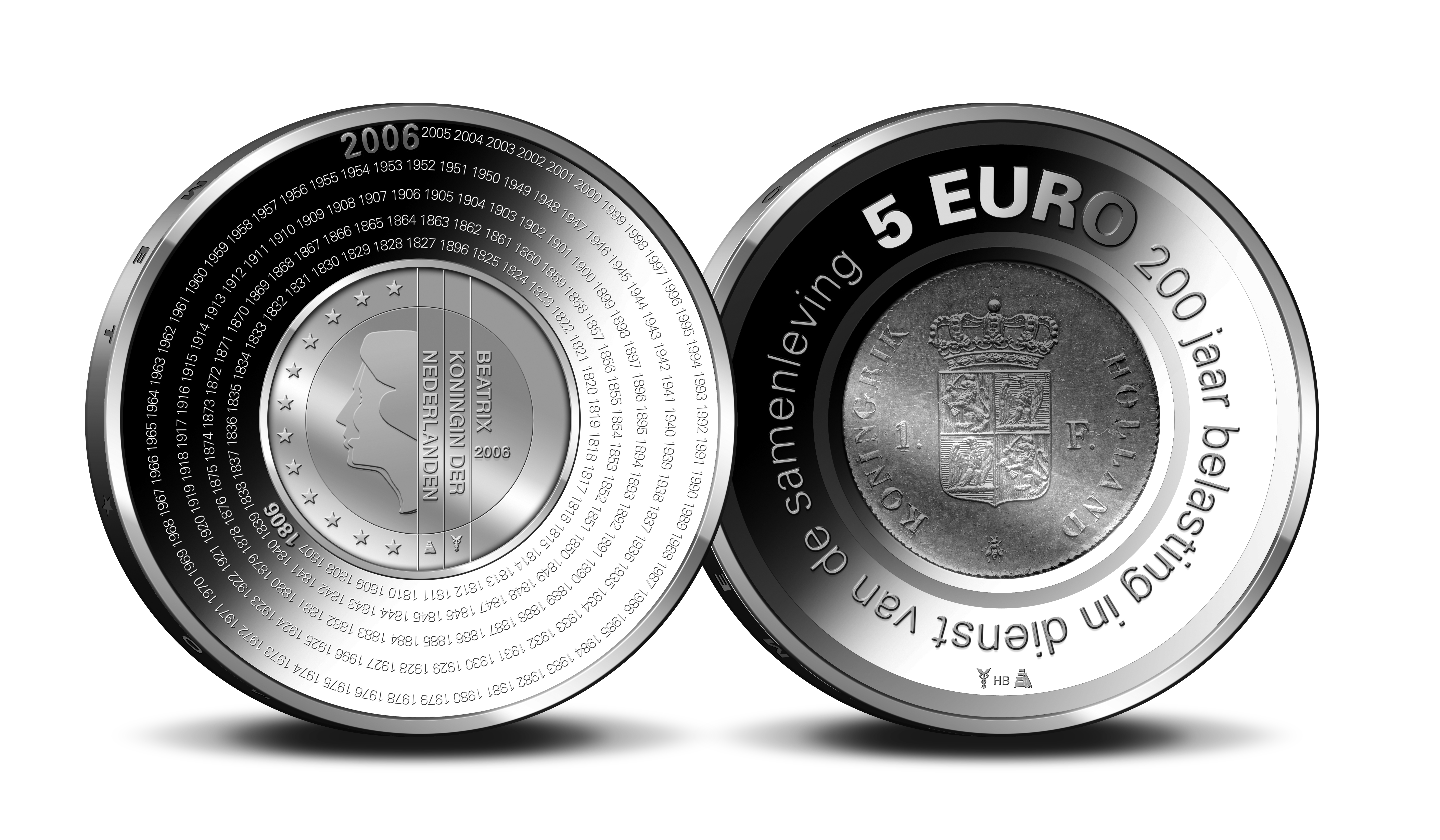 Ontwerp van herdenkingsmunt 'het Belasting Vijfje', een officieel wettig betaalmiddel van vijf euro in Nederland.